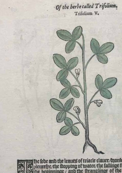 Illustration der Gattung Klle (Trifolium) in William Turners: The herbal aus dem Jahr 1548